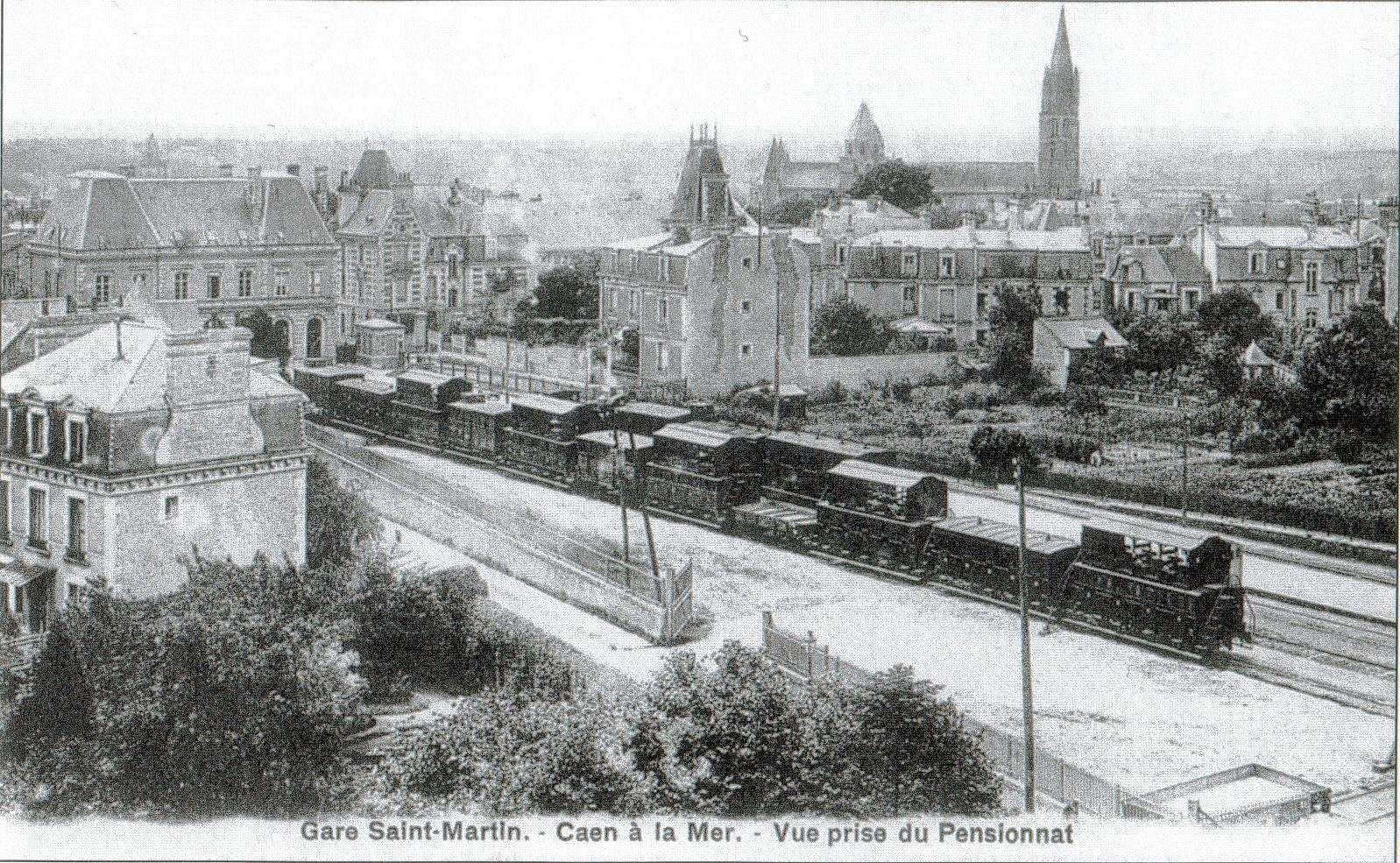 Quais de la gare Saint-Martin depuis le Pensionnat Saint-Joseph.